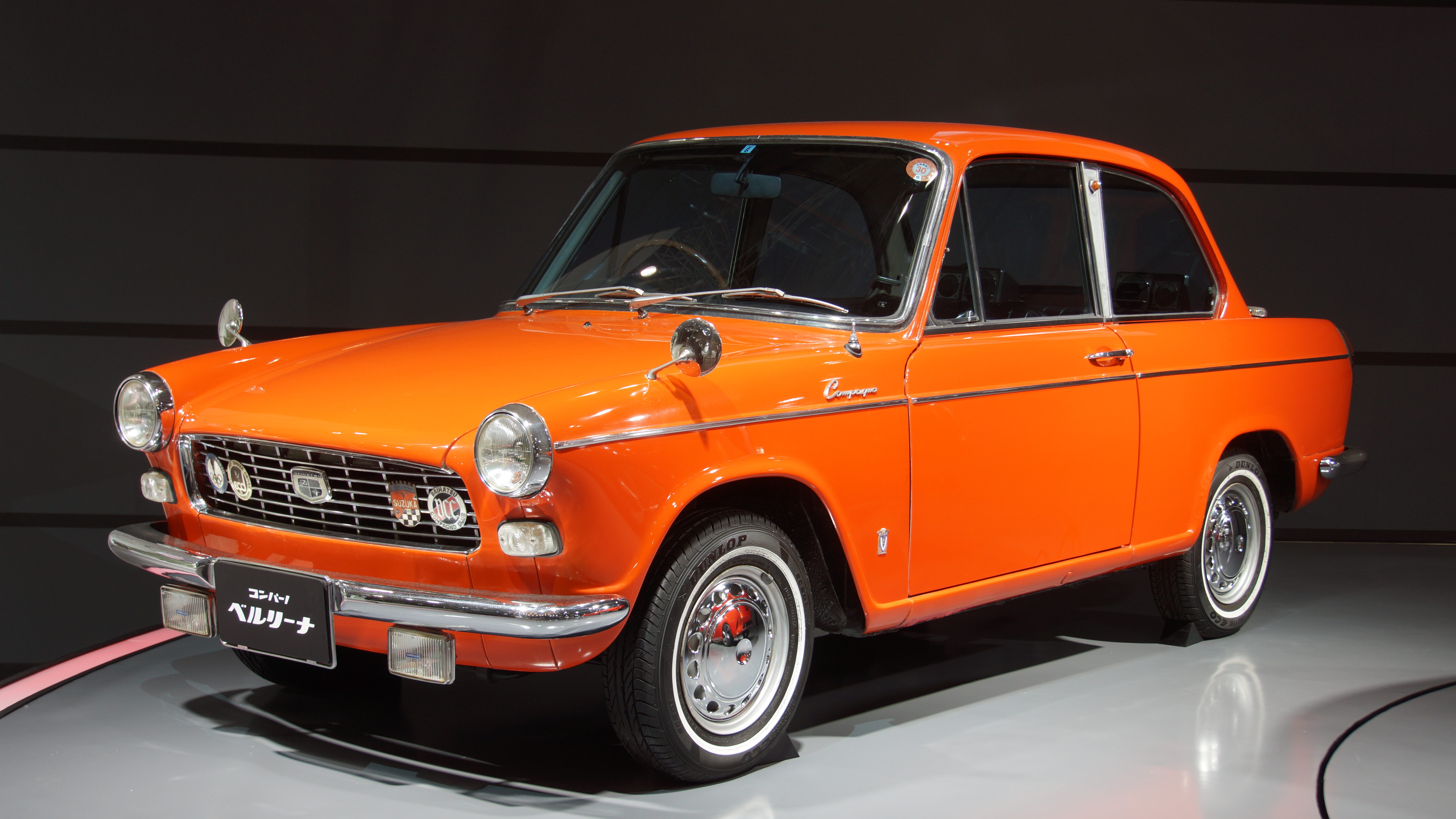 ダイハツ・コンパーノ・ベルリーナ 左前面。2017年12月10日 第10回大阪モーターショーにて。